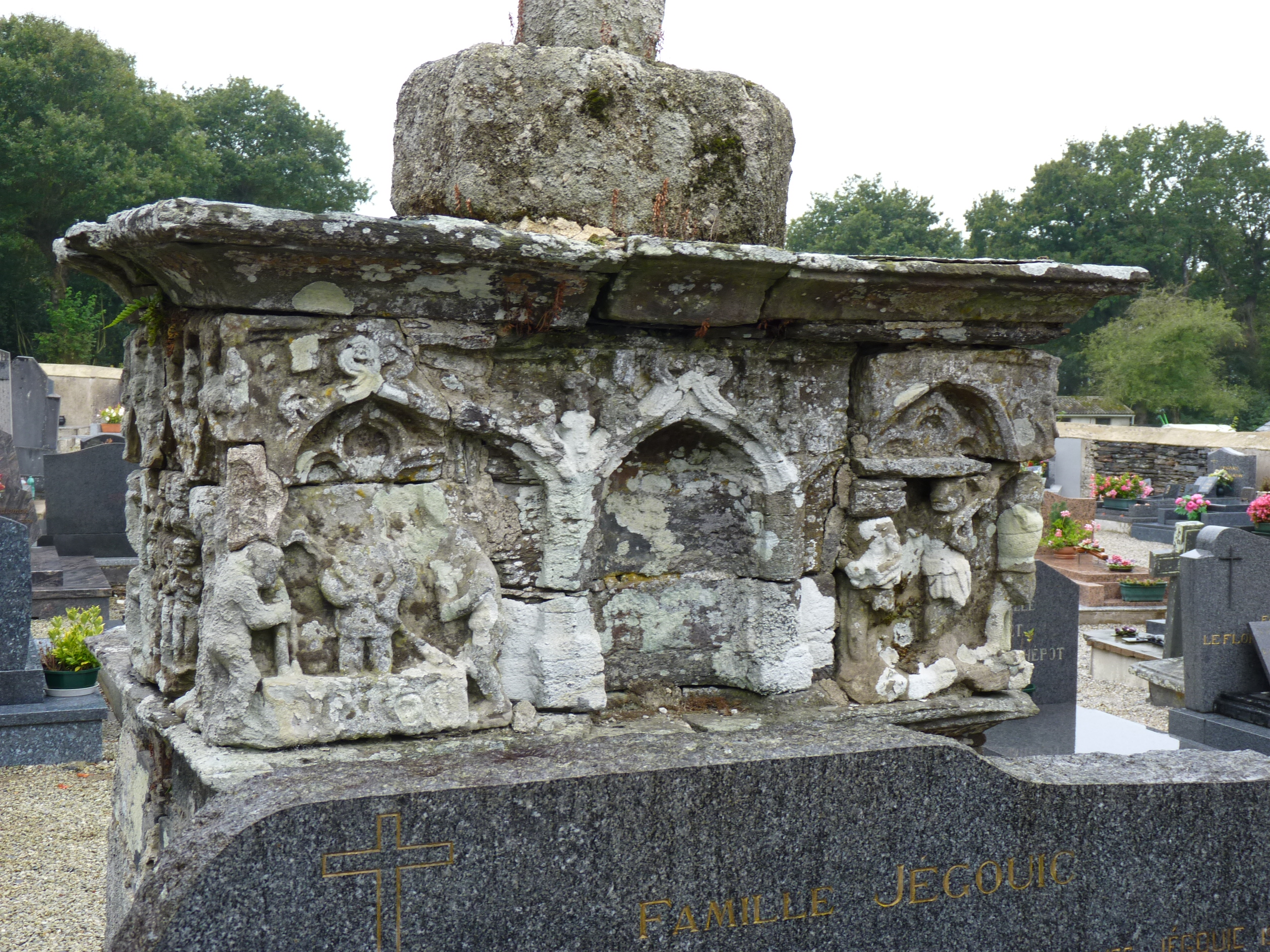 Dans l'enclos de la chapelle.